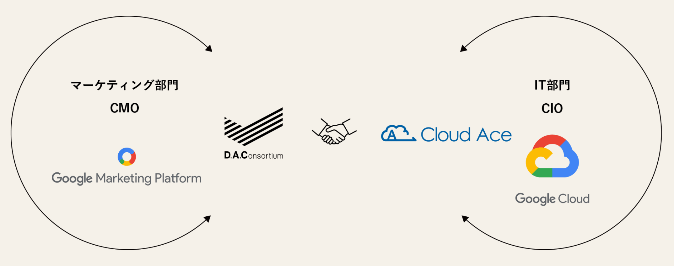 DACとCloudAce